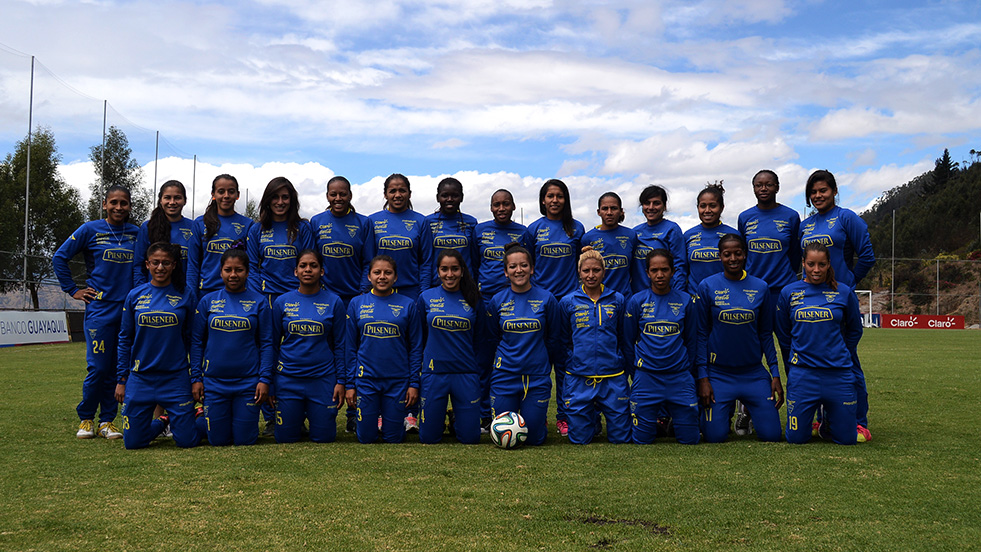 Quito, 13 de agosto de 2014 (Andes) .- La selección femenina de fútbol entrena en la casa de la selección. Fotografía: Carlos Rodríguez L.